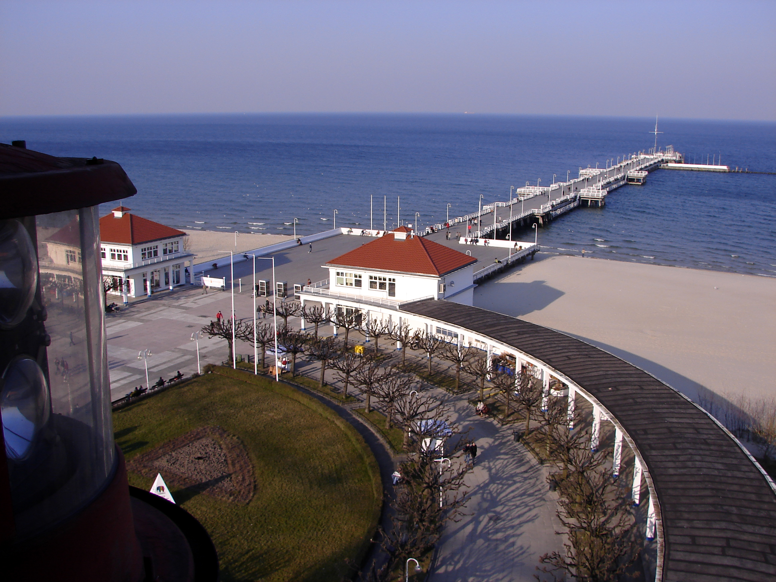 Molo, Sopot, Poland